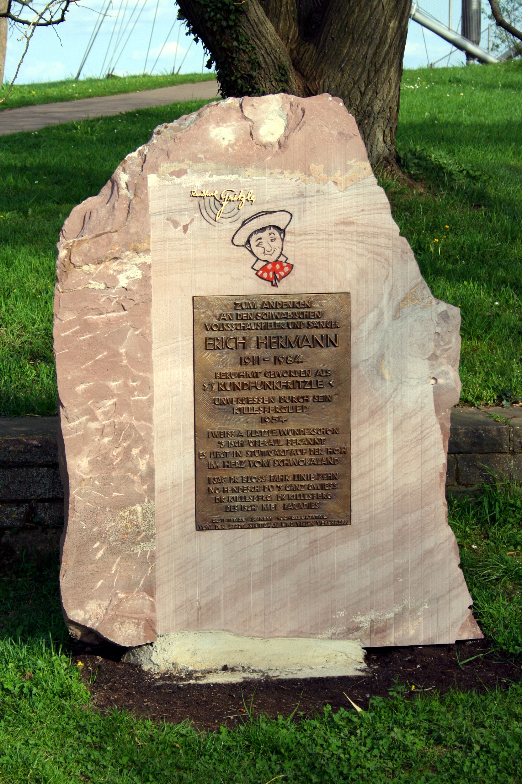 Denkmal für Erich Hermann im Killesbergpark in Stuttgart unweit des Killesbergturms